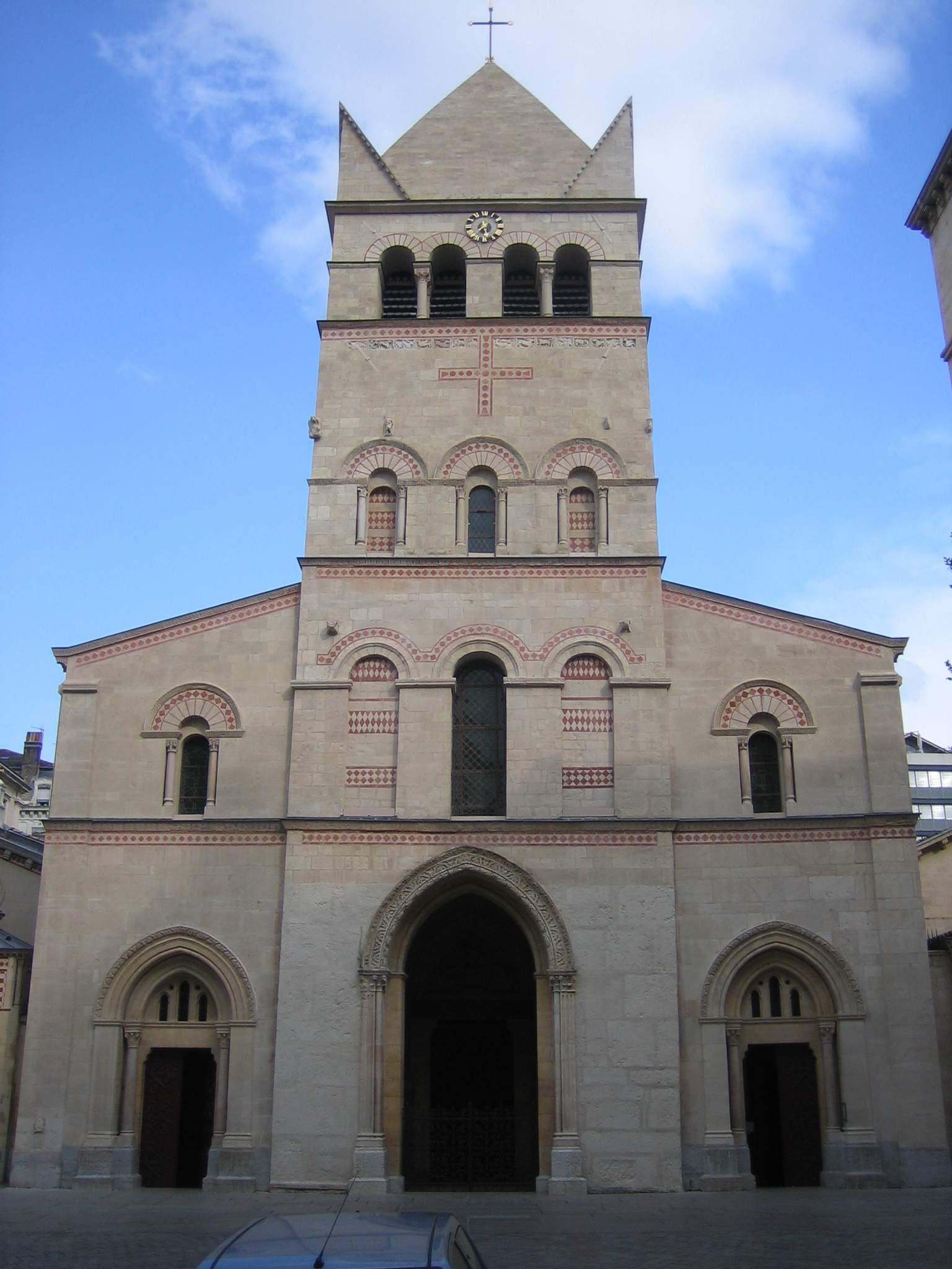 Basilique Saint Martin d'Ainay, Lyon, France